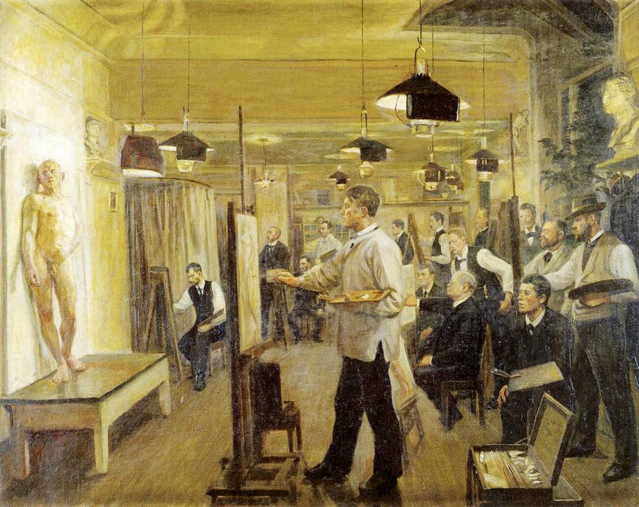 Zahrtmanns malerskole, Olie på lærred, 96,4 x 125,8 cm